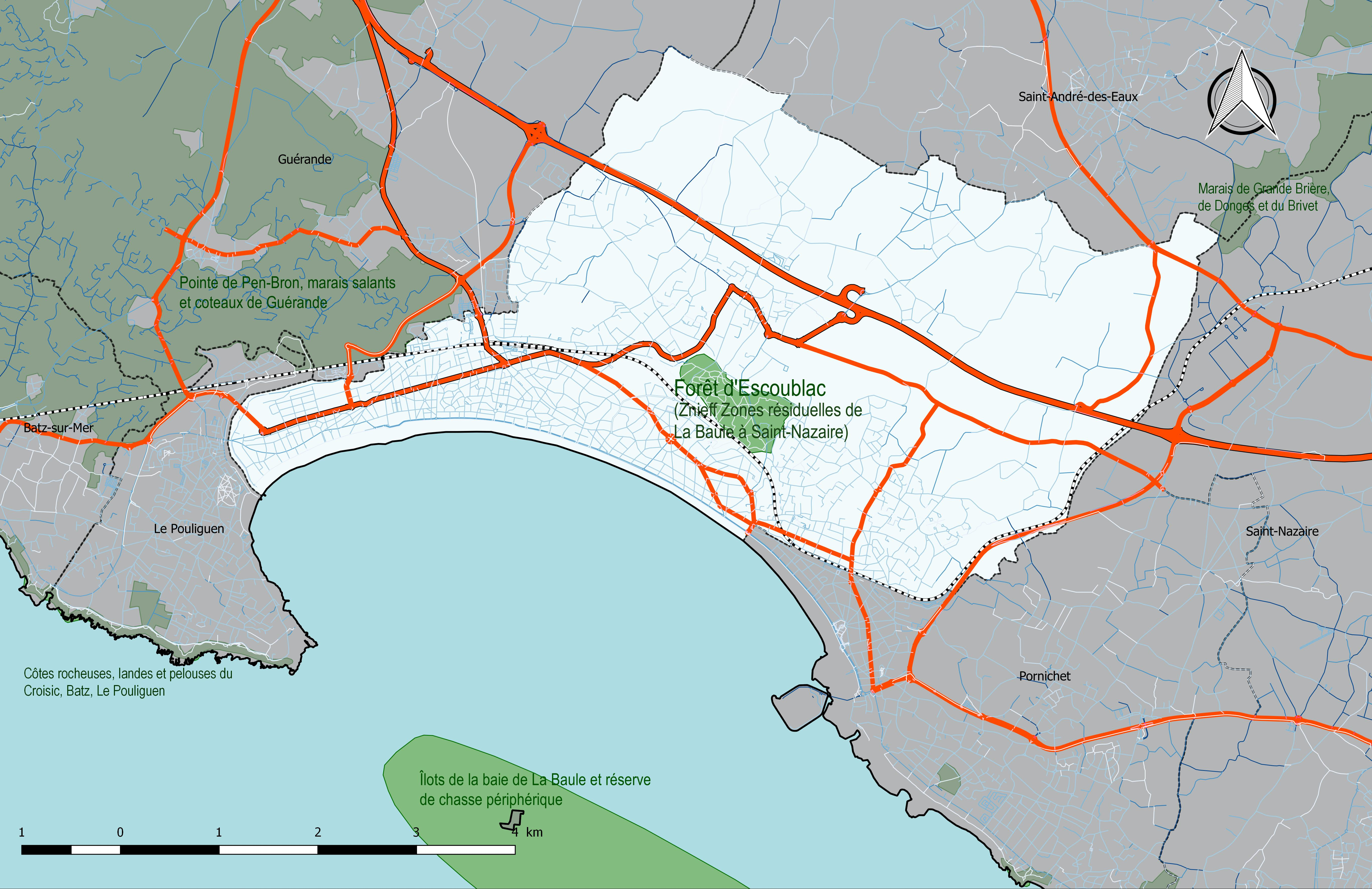 Commune de La Baule-Escoublac - Carte des ZNIEFF de type 2.